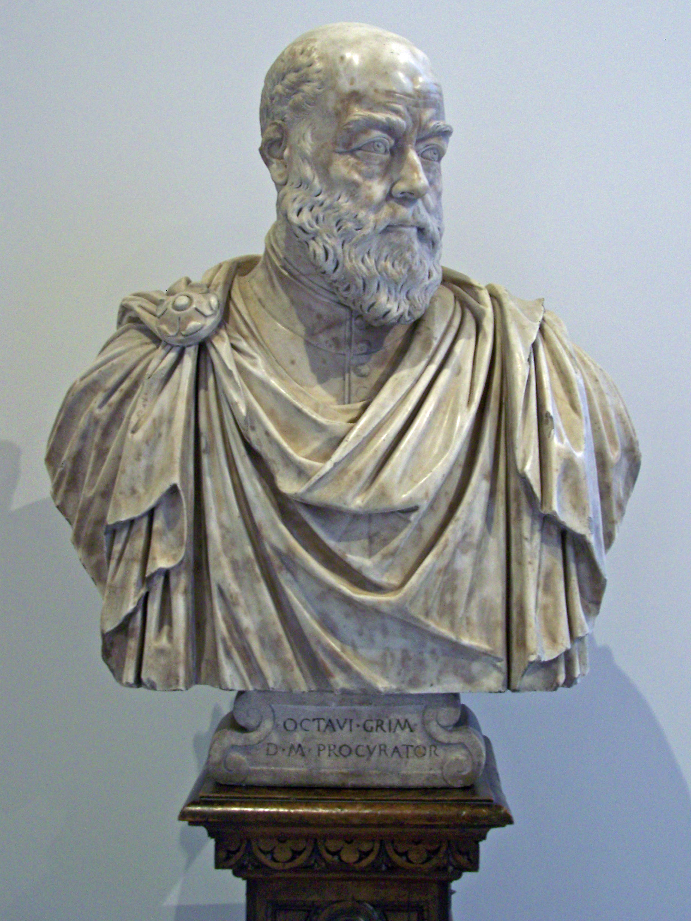 Ottavio Grimani, Büste von Alessandro Vittoria, Venedig um 1570, Bode-Museum Berlin